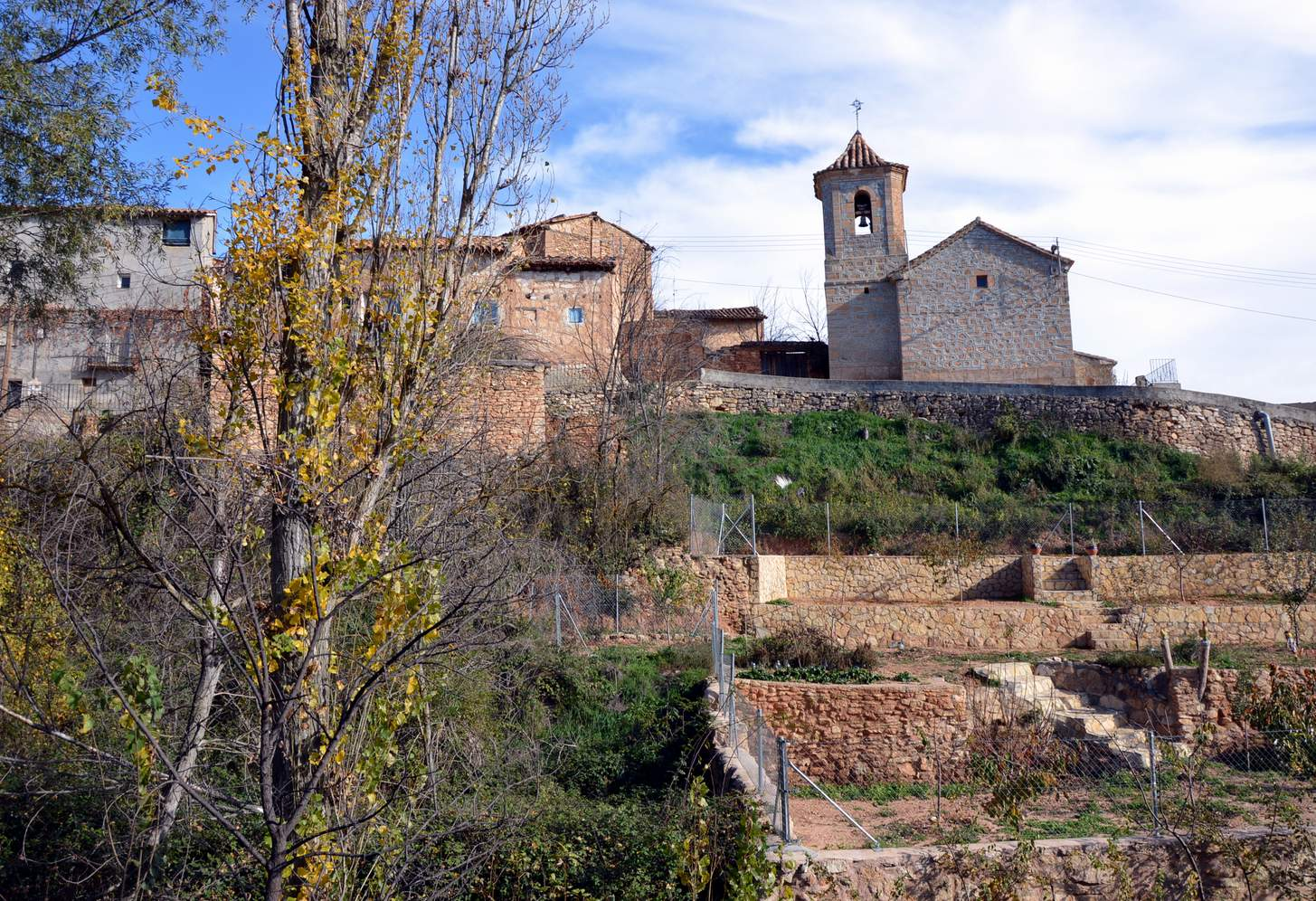 Vista parcial del caserío de Mas del Olmo, Ademuz (Valencia), con detalle de la parroquial.